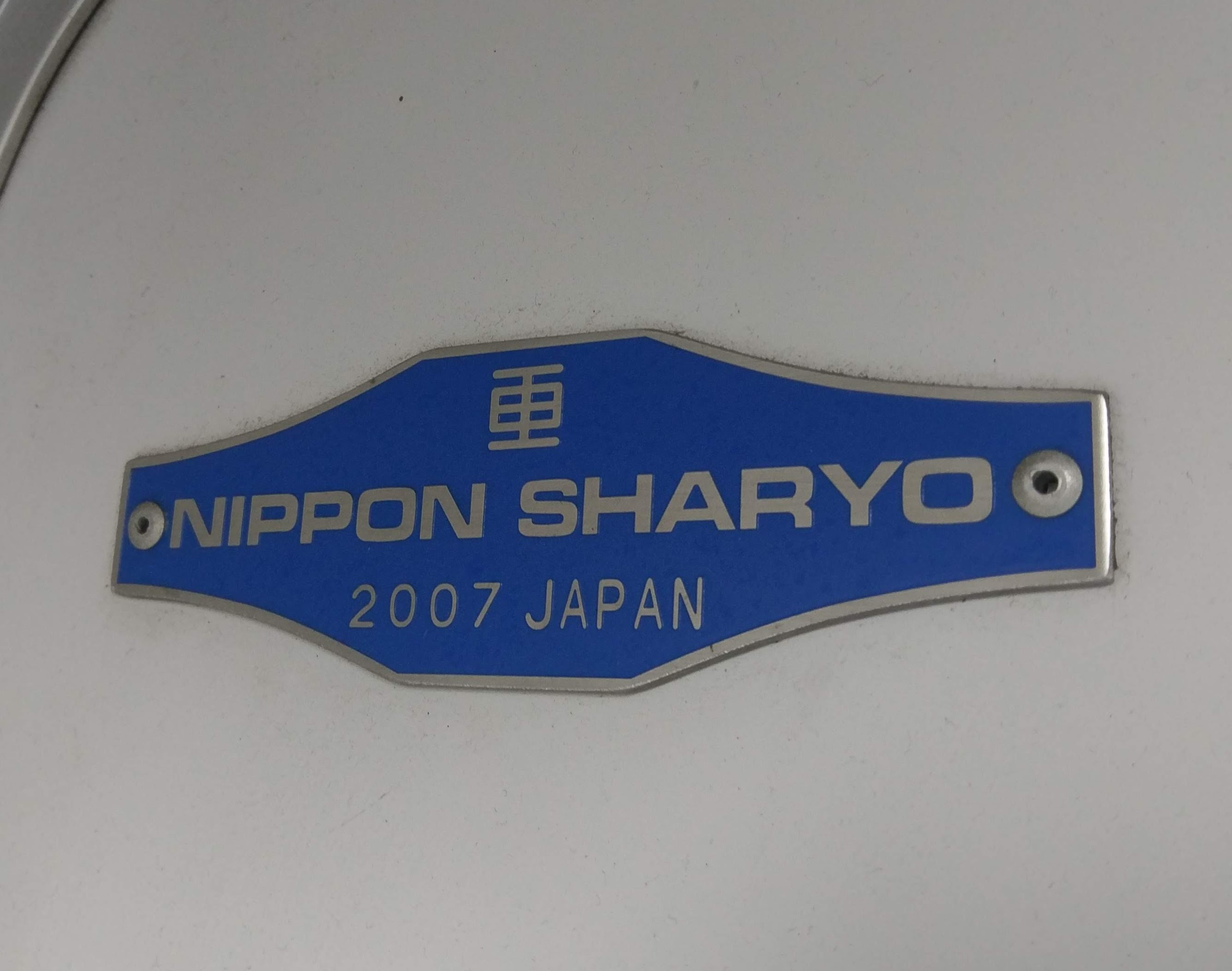 中文（台灣）: 台鐵EMU700型電聯車內的日本車輛銘板